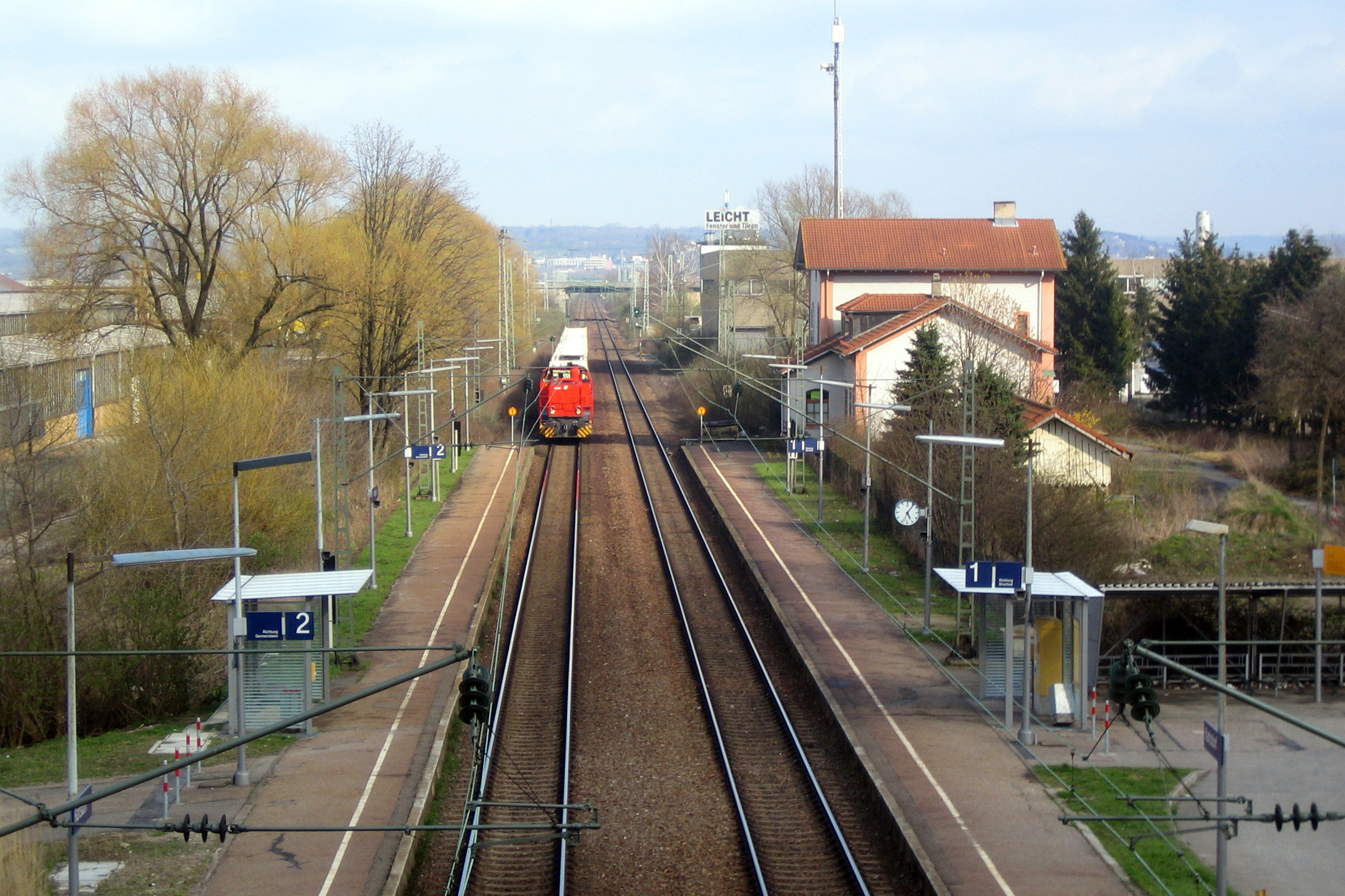 Bf. Karlsdorf, selbst fotografiert